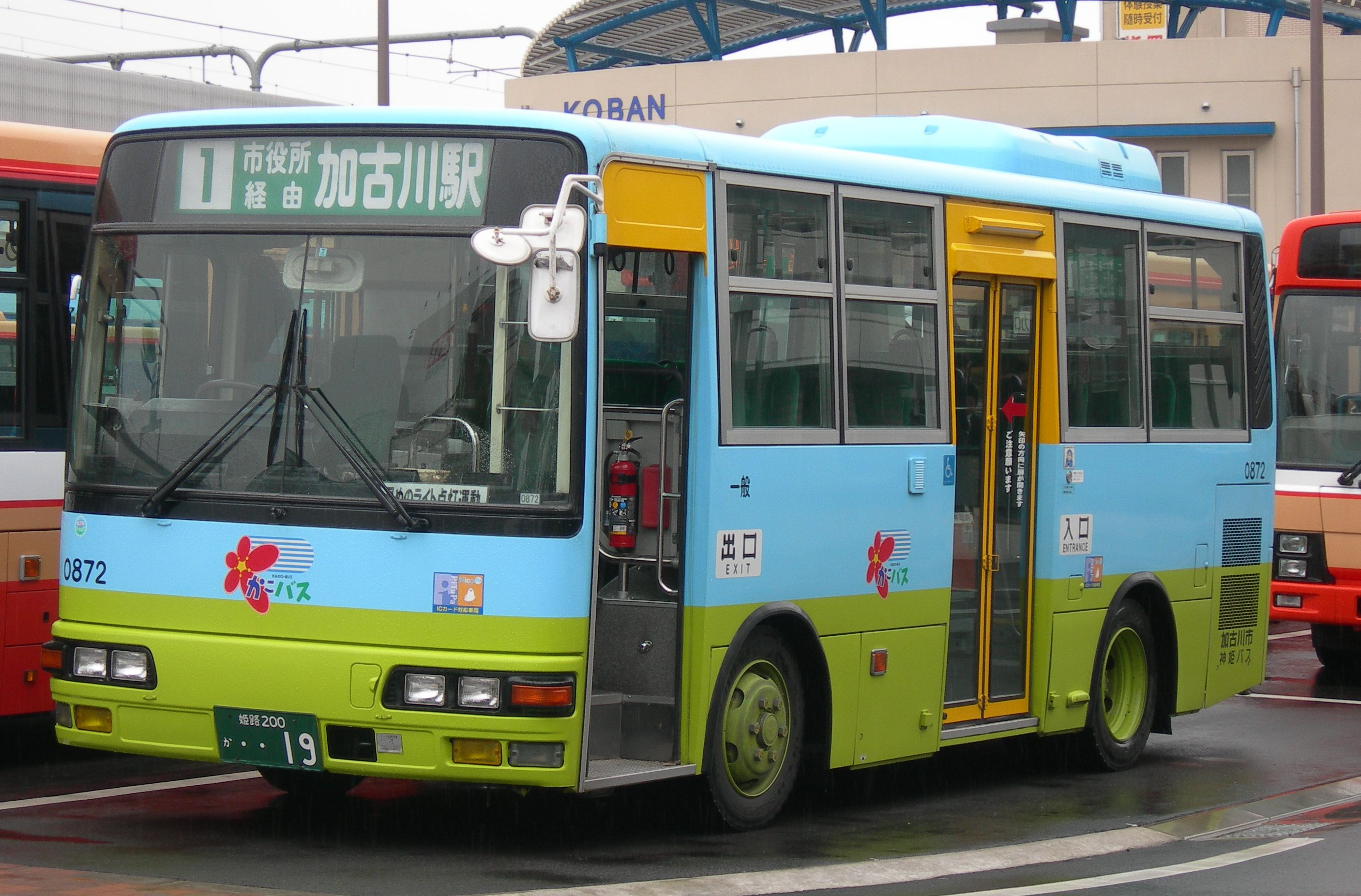 加古川市ゾーンバス（通称かこバス） 三菱ふそう・エアロミディMJ KC-MJ218F